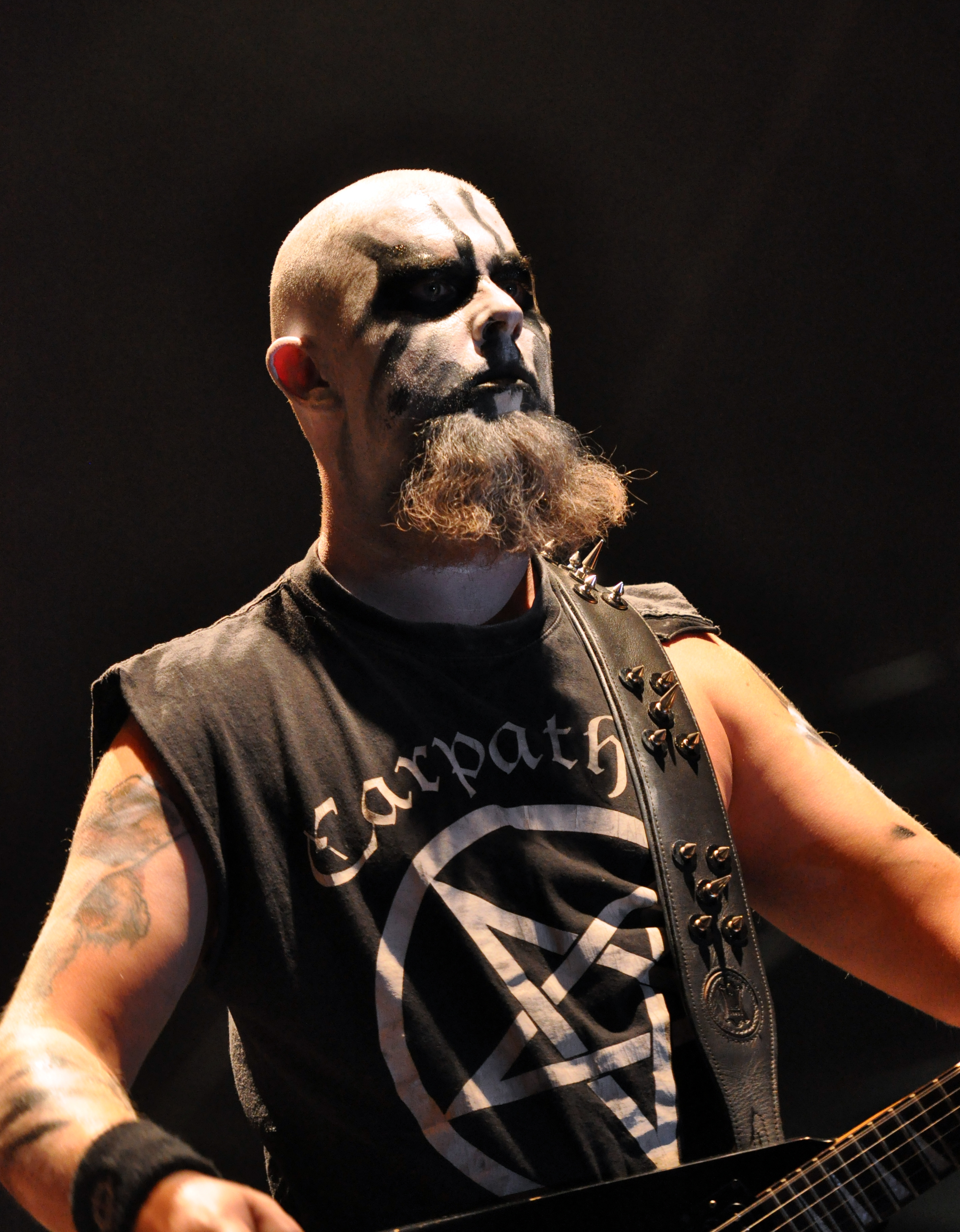 Carpathian Forest at Party.San Metal Open Air 2013